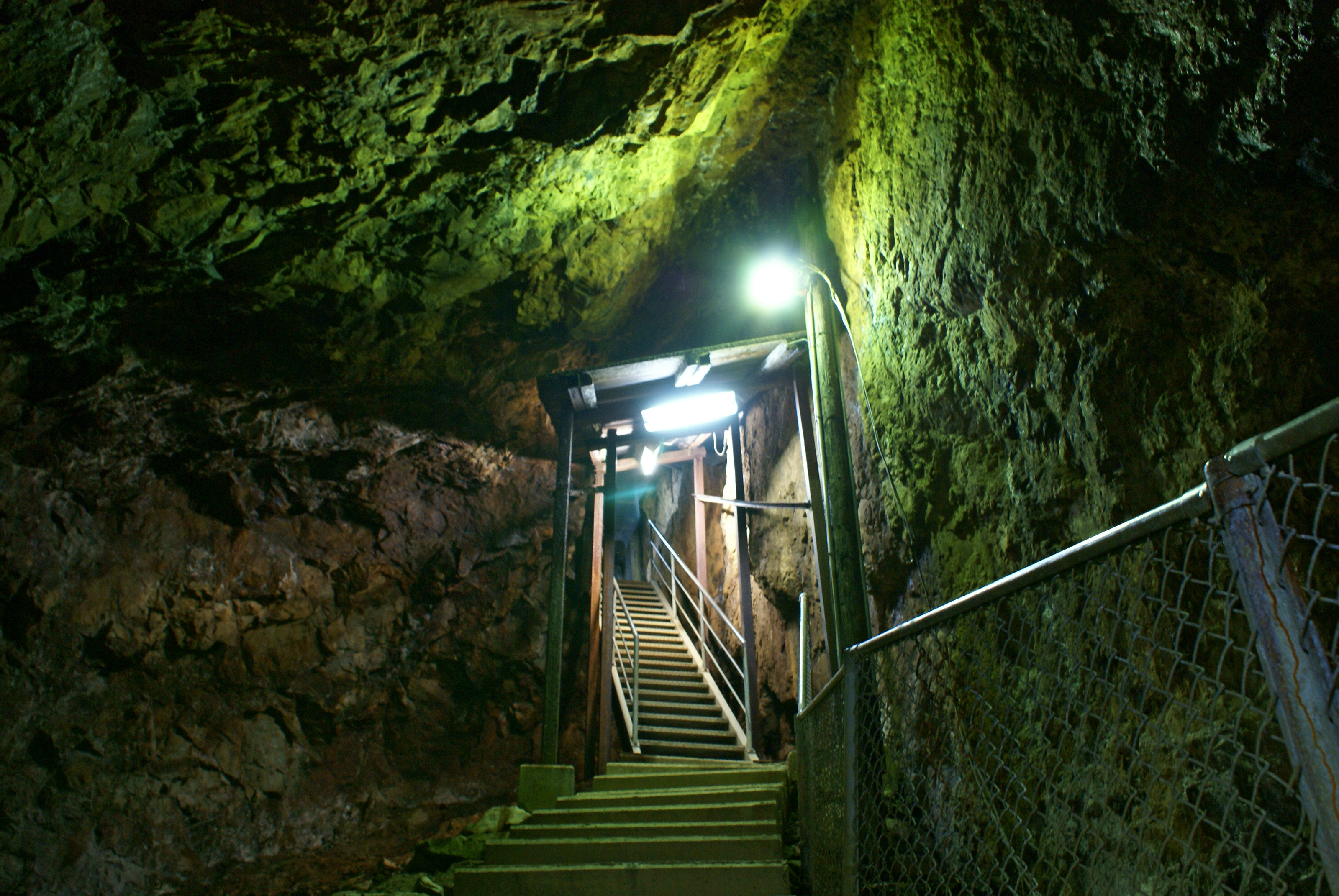 Sasaune gallery of Yoshioka copper mine, Takahashi, Okayama, Japan